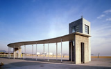 playa del Arbeyal